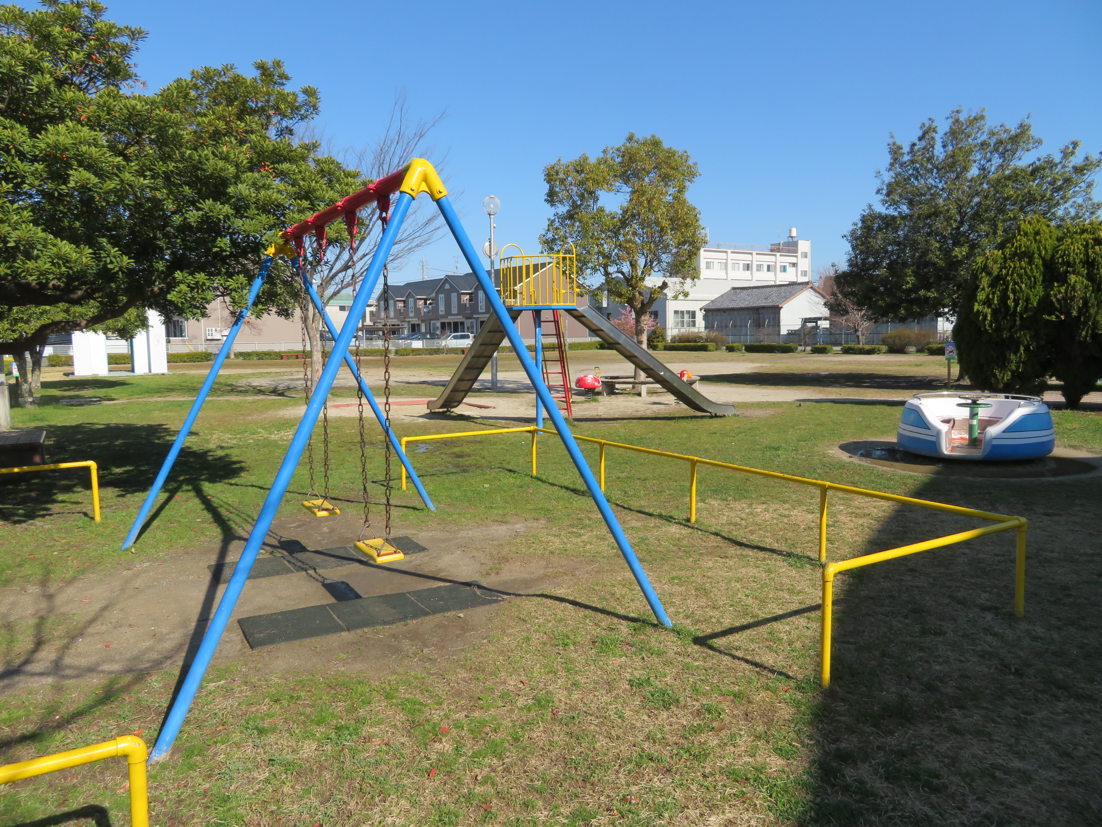 渡町公園（岡崎市渡町）